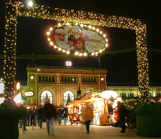 Weihnachtsmarkt am Hauptbahnhof Hannover, Niedersachsen, Deutschland.